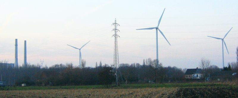 Drie windturbine en Electrabelcentrale te Schelle.